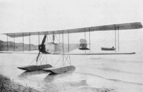 Авро 501 на стоянке